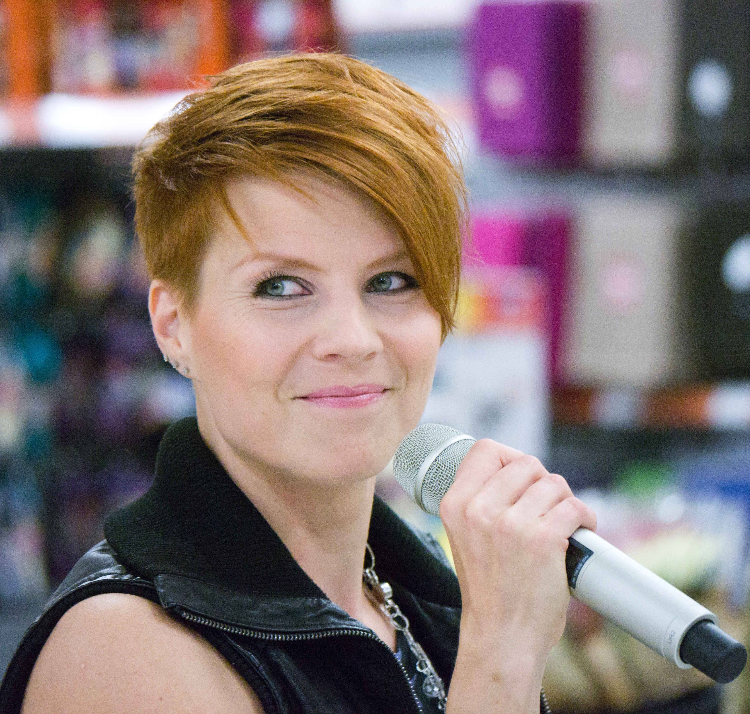 Heidi Kyrö, suomalainen laulaja